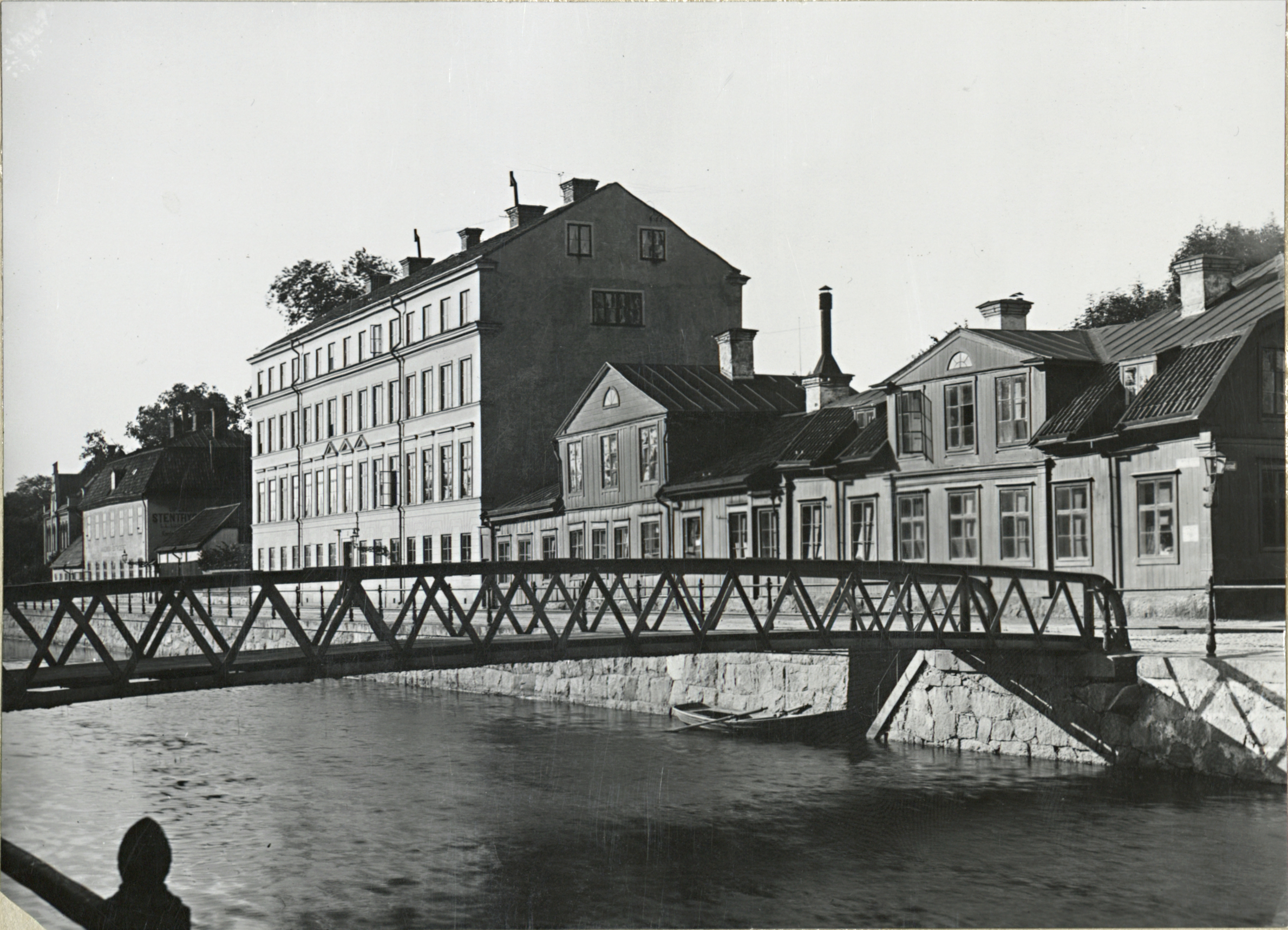 Västgötaspången över Fyrisån och bostadshuset Olympen, studentbostadshuset Imperfectum och Plusquamperfectum vid Västra Ågatan, Uppsala 1901 - 1902